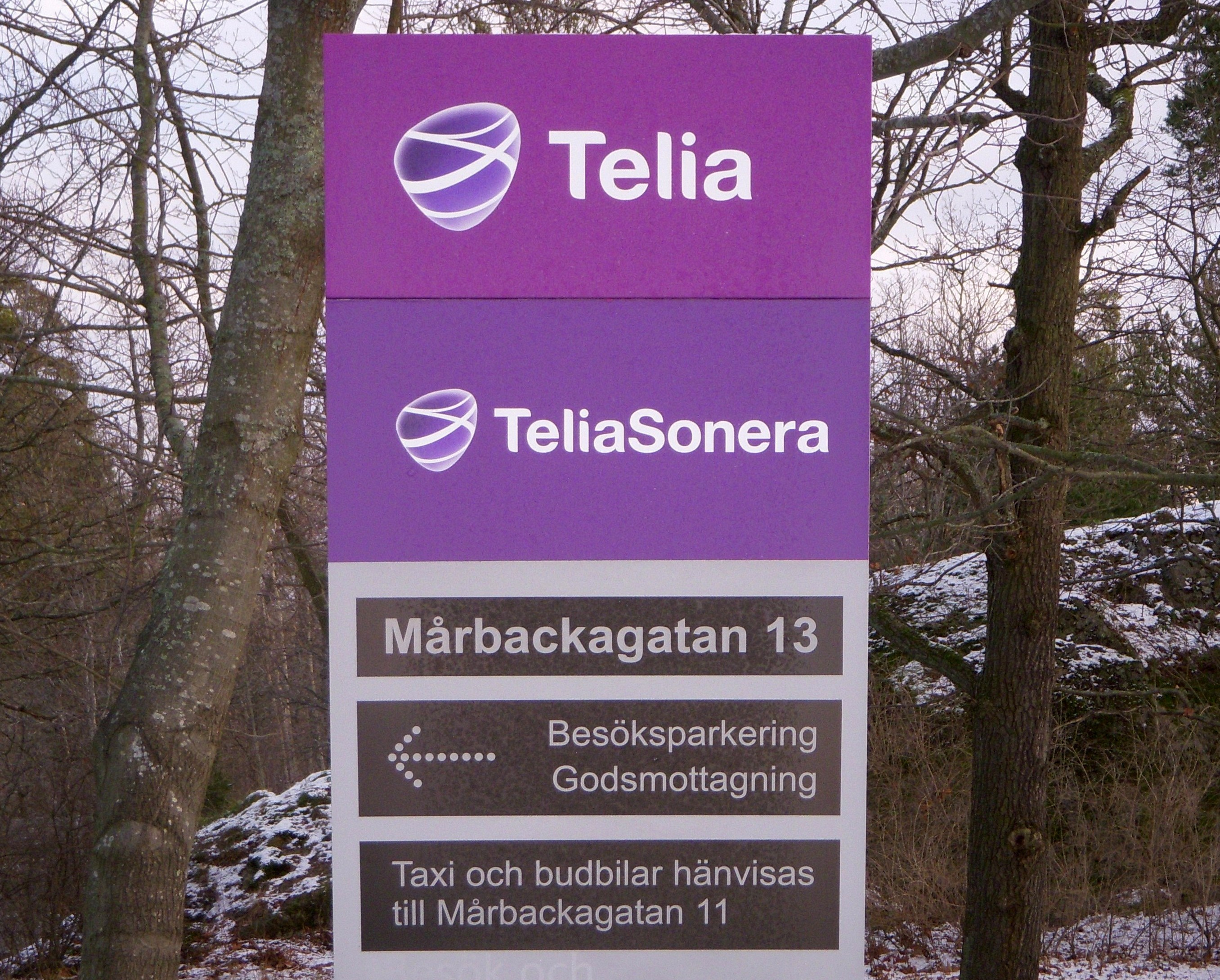 Larsboda, TeliaSoneras huvudkontor